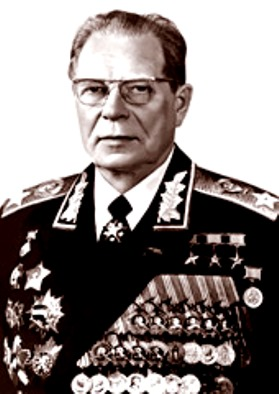 Дмитрий Фёдорович Устинов (1908 — 1984) — советский военачальник и государственный деятель